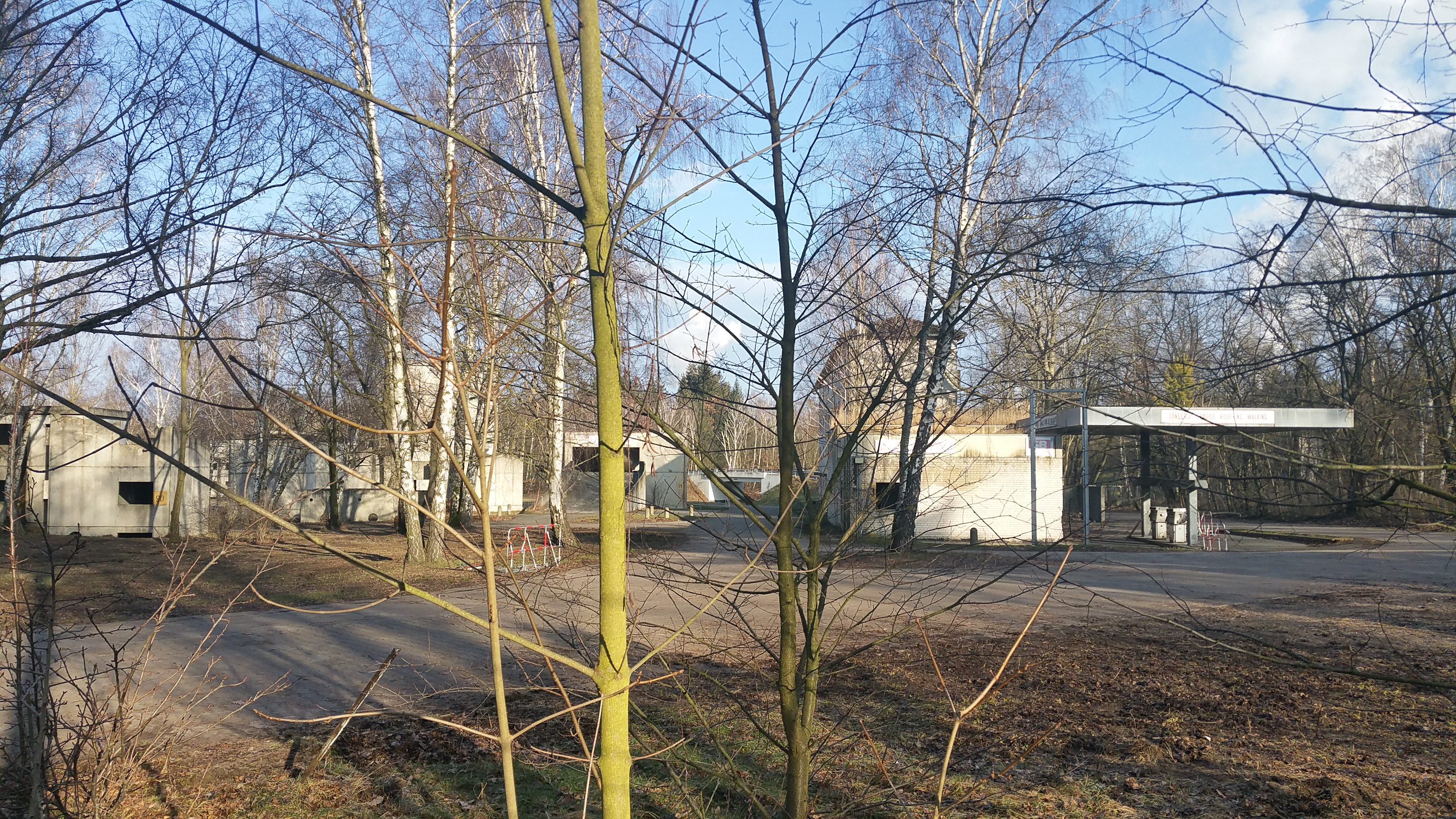 Blick auf Gebäude der Fighting City Ruhleben, Häuserkampfanlage mit Hochhaus, Tankstelle, Brücke, etc. Betreiber Polizei Berlin